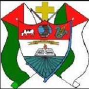 Escudo del municipio